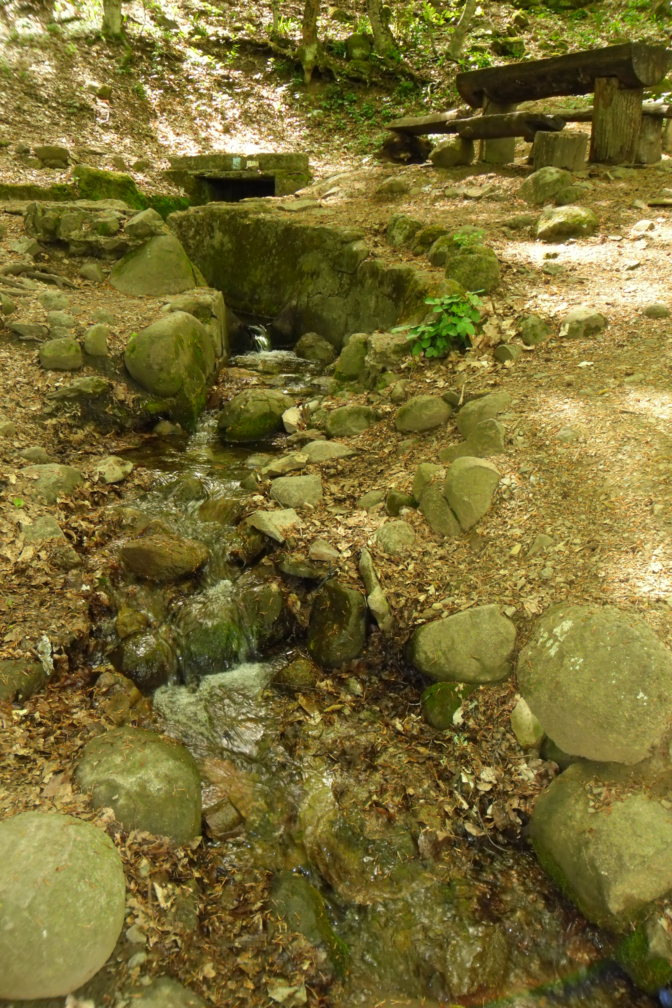 Фото